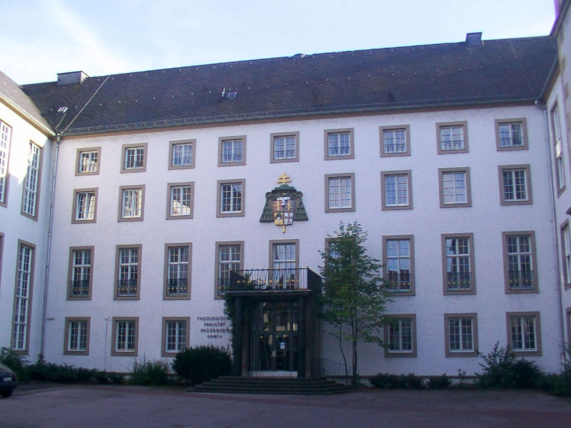 Paderborn: Theologische Fakultät